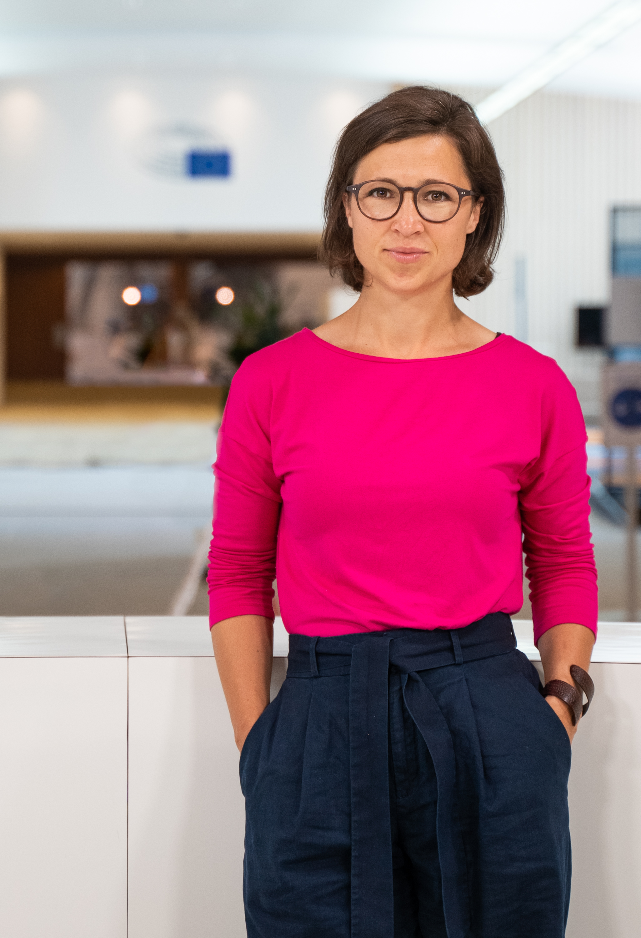 Hannah Neumann im Europäischen Parlament